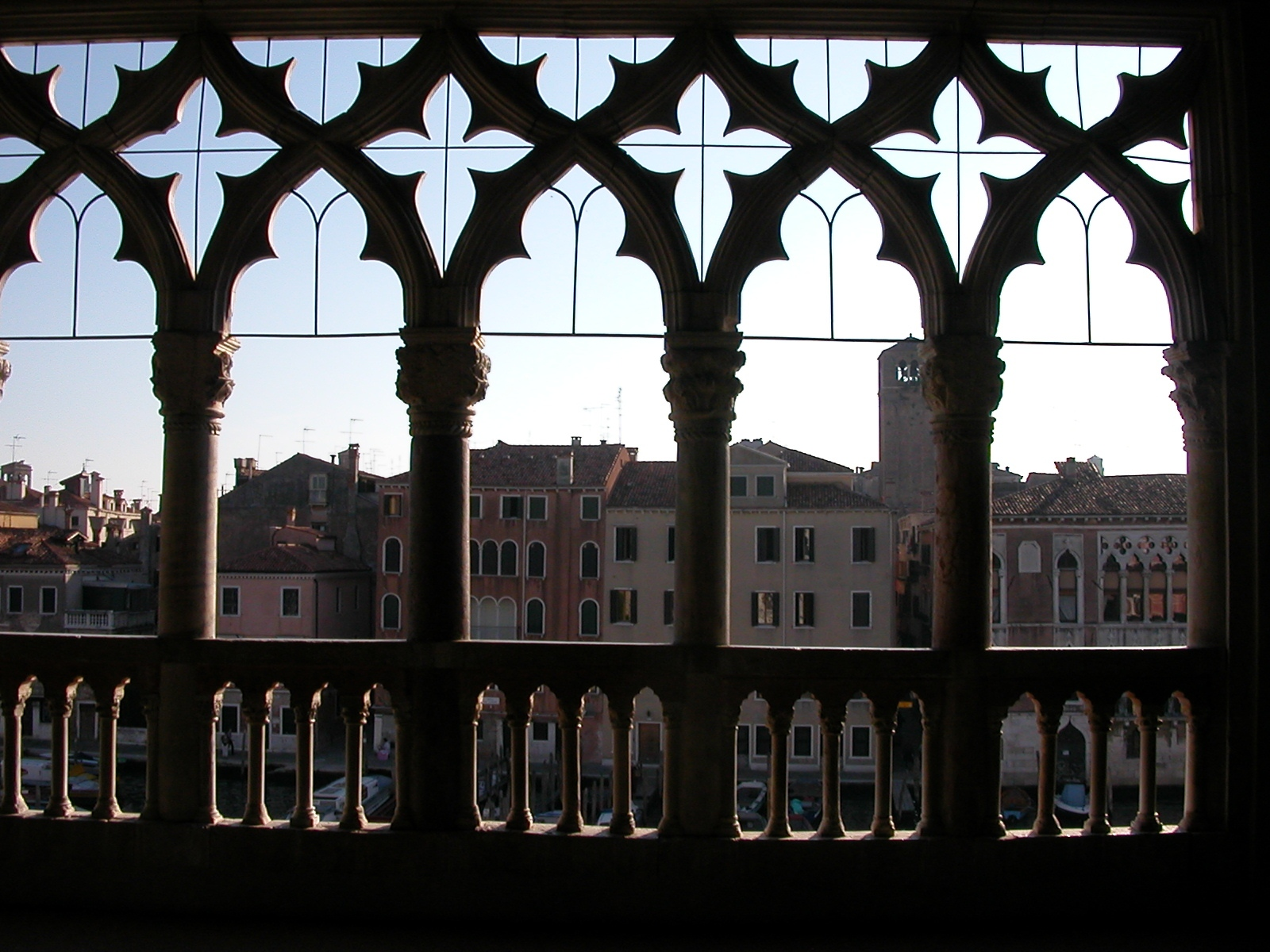 Venezia - Ca' d'Oro.